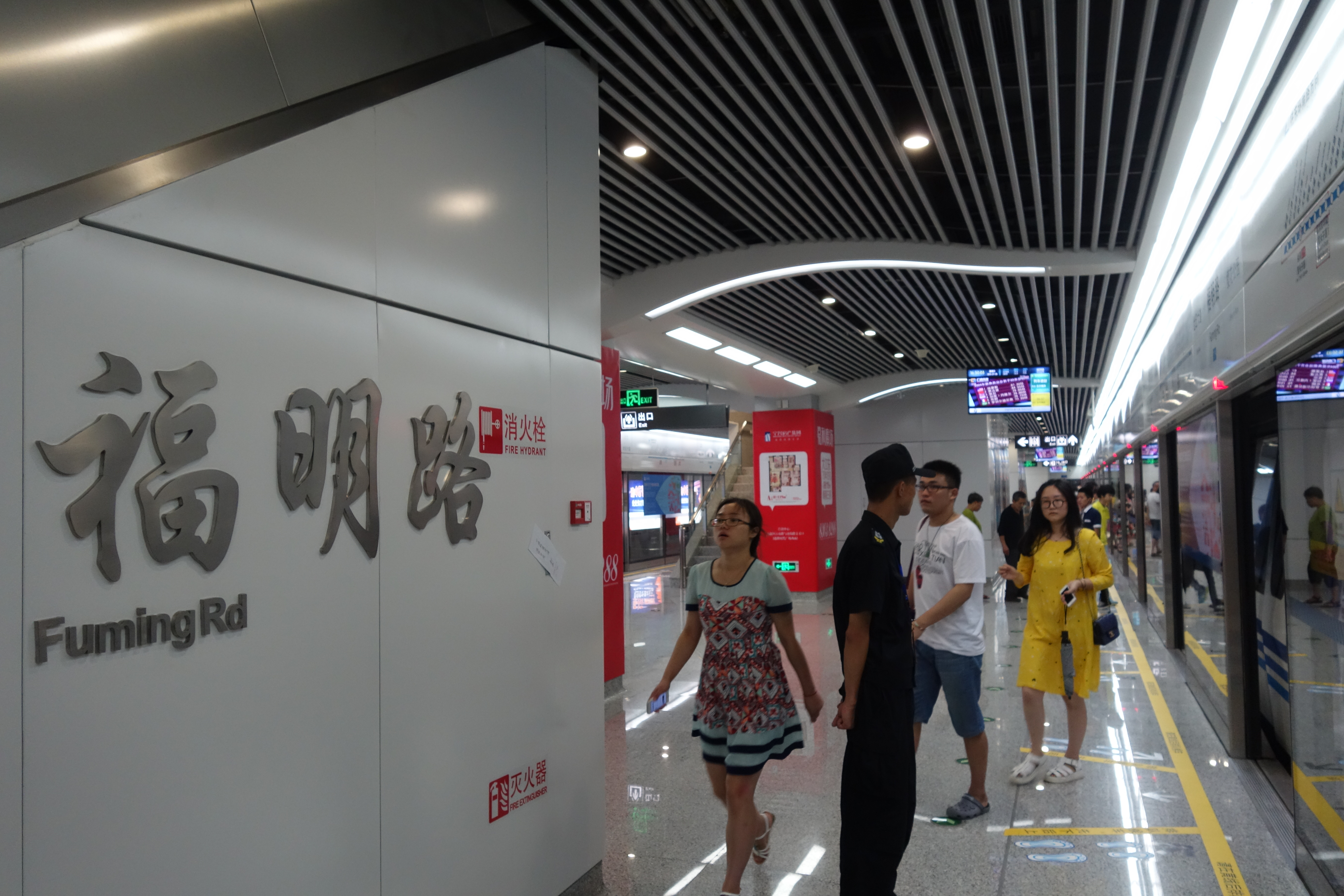 福明路站站台